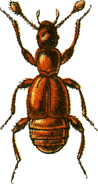 This file has been extracted from another file: Jacobs16.jpg